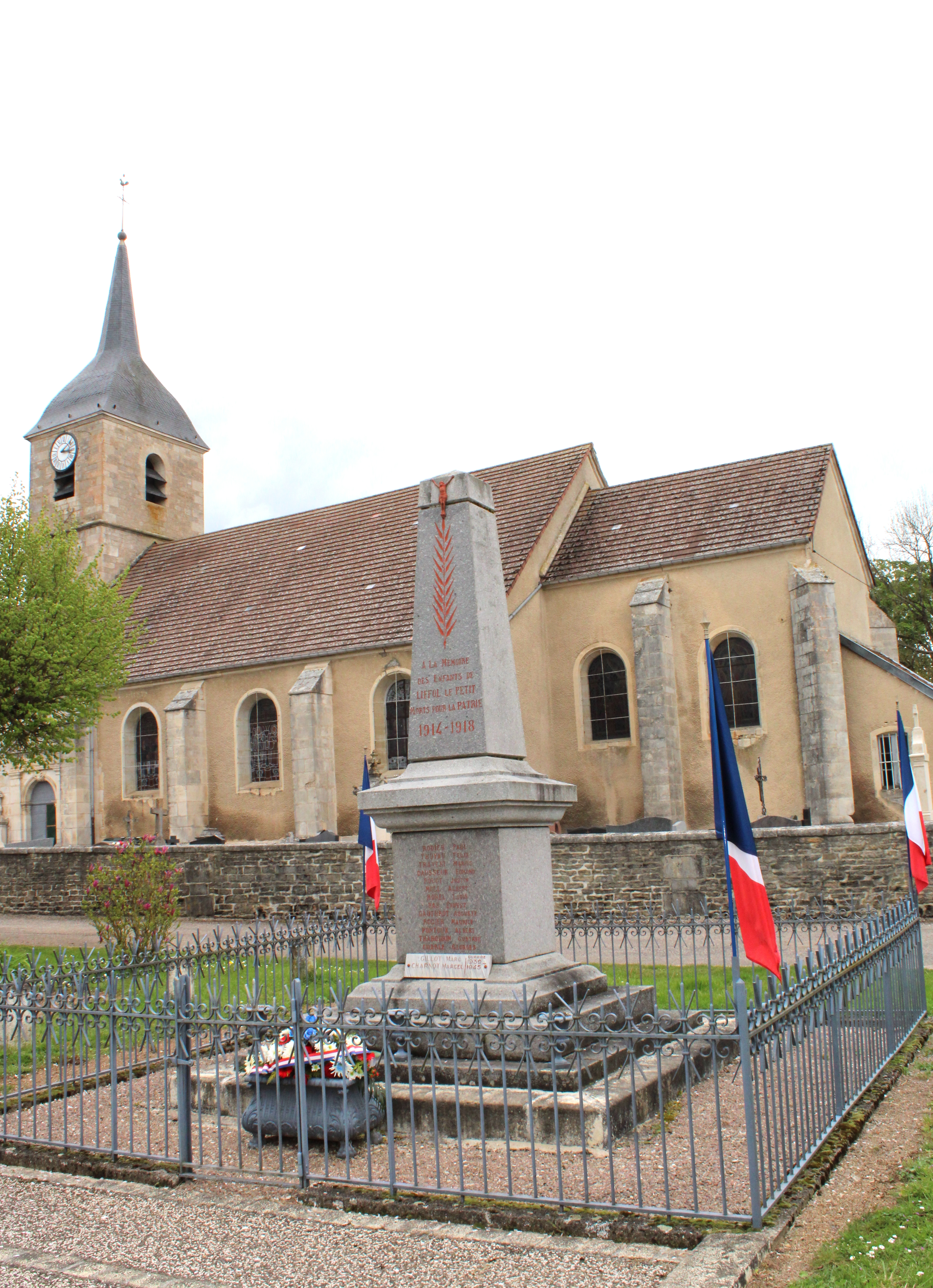 Le monument aux morts